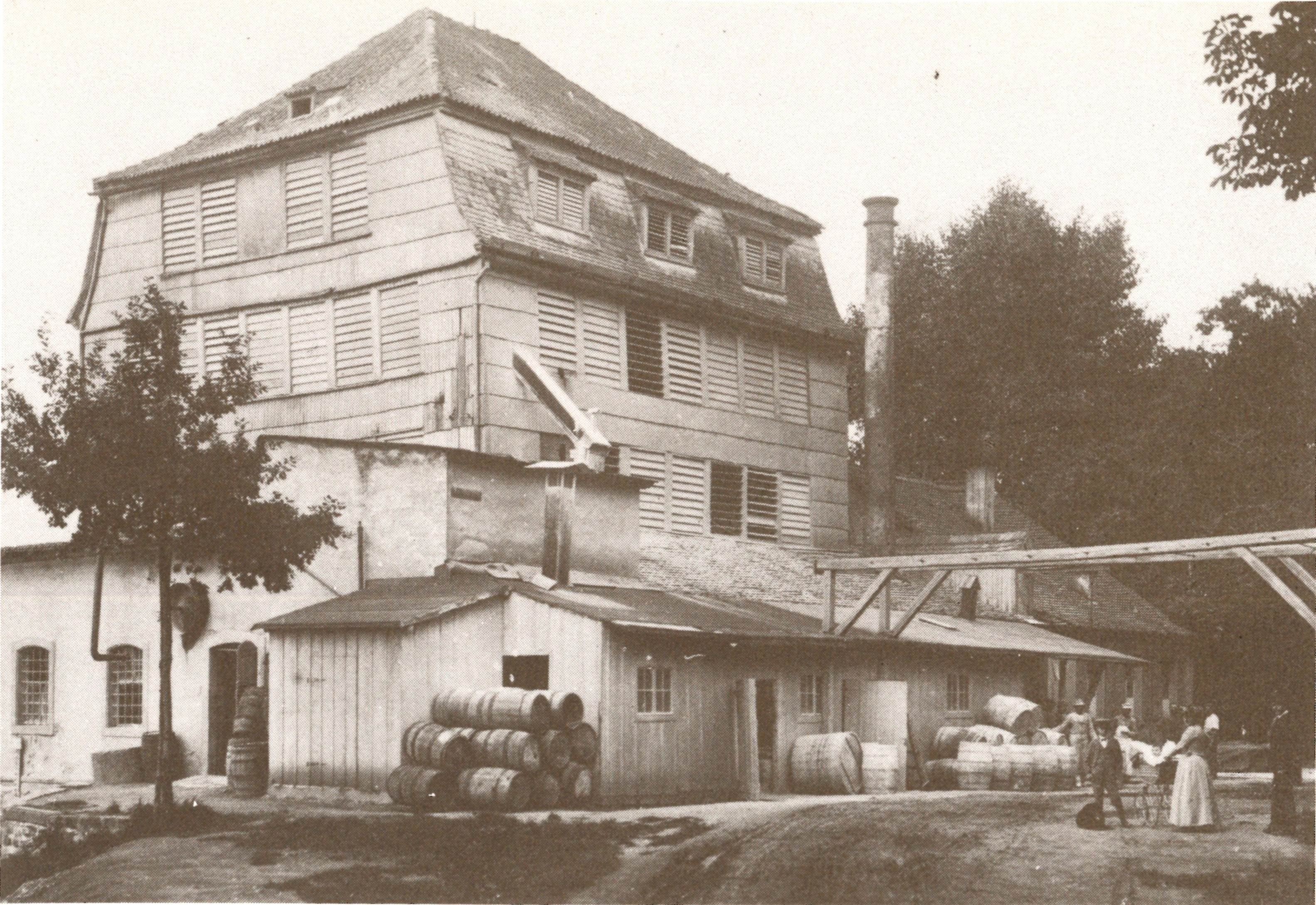 Schweinfurt Fotografie um 1891: Bleiweißmühle Gademann und Co.